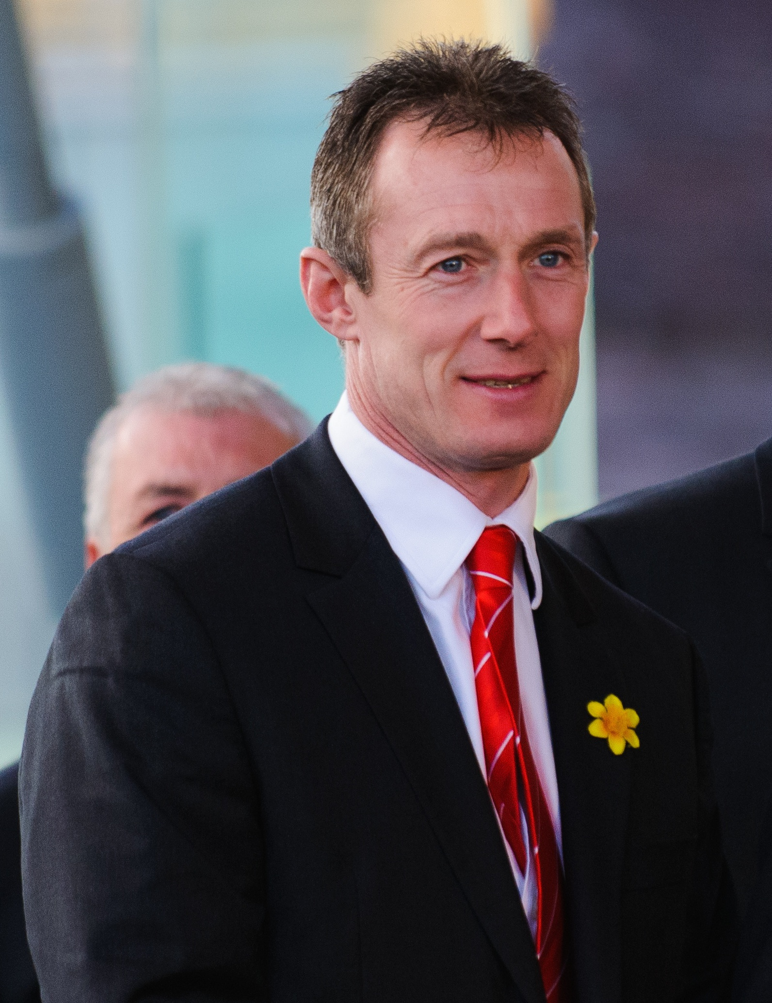 Robert Howley, Mark Davies and Sean Edwards arrive. Wales Grand Slam Celebration, Senedd 19 March 2012 / Robert Howley, Mark Davies a Sean Edwards yn cyrraedd, Dathliadau Camp Lawn Cymru, Senedd 19 Mawrth 201